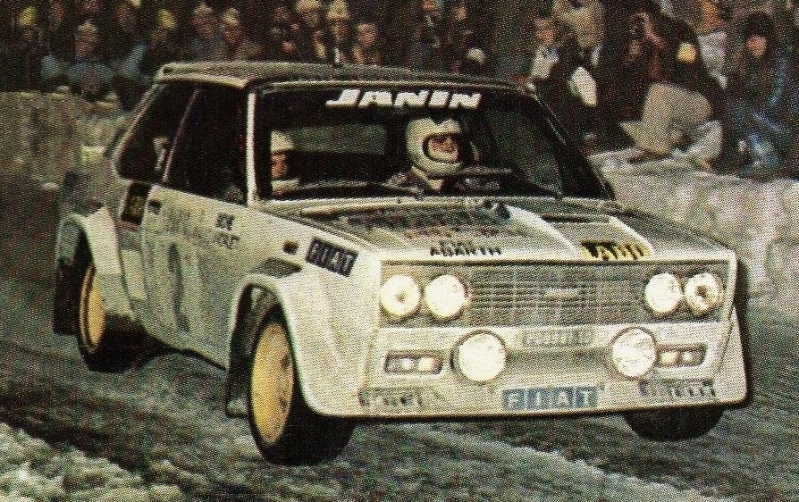 Jean-Claude Andruet sur Fiat Abarth 131 en 1977 (Monte Carlo - col du Turini) - Panini Super Auto 77' n°39.